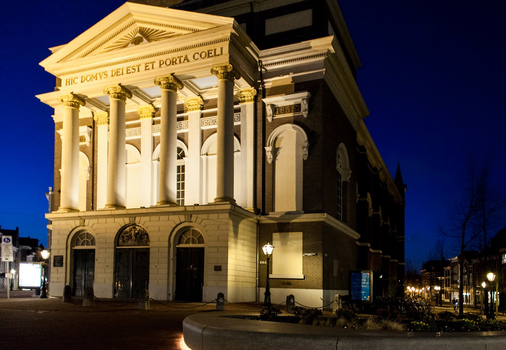 Nachtopname van Hartebrugkerk, Leiden, in 2018